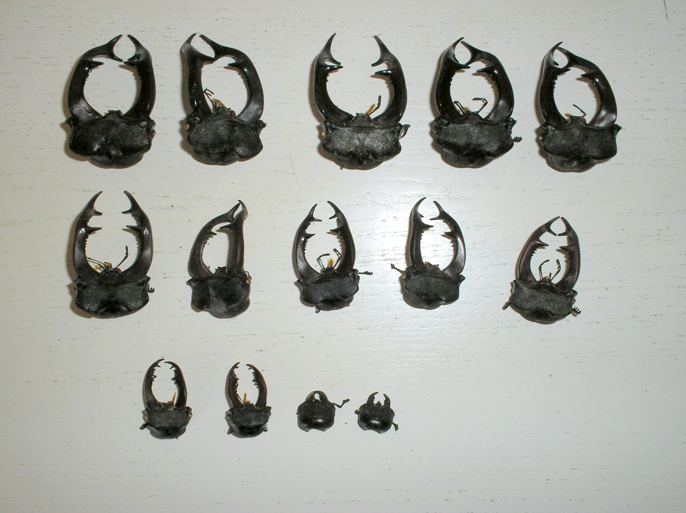 Tête de lucanes cerf-volants